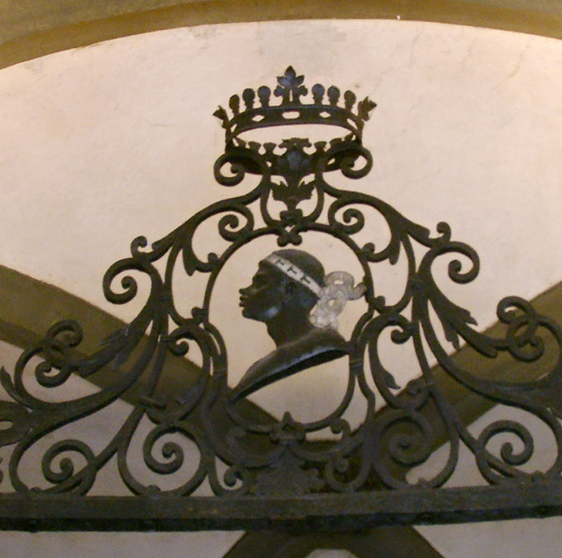 Palazzo Pucci, stemma su cancellata